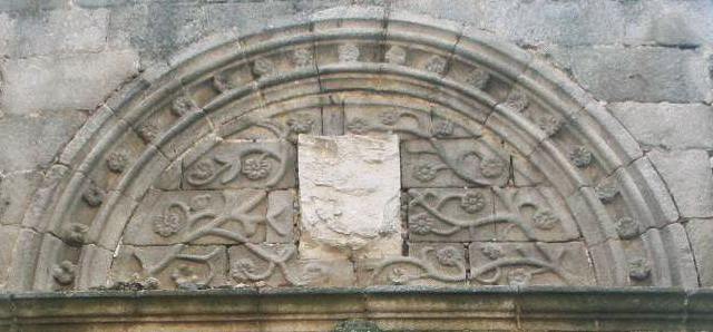 Avila - Hospital de Santa Escolastica